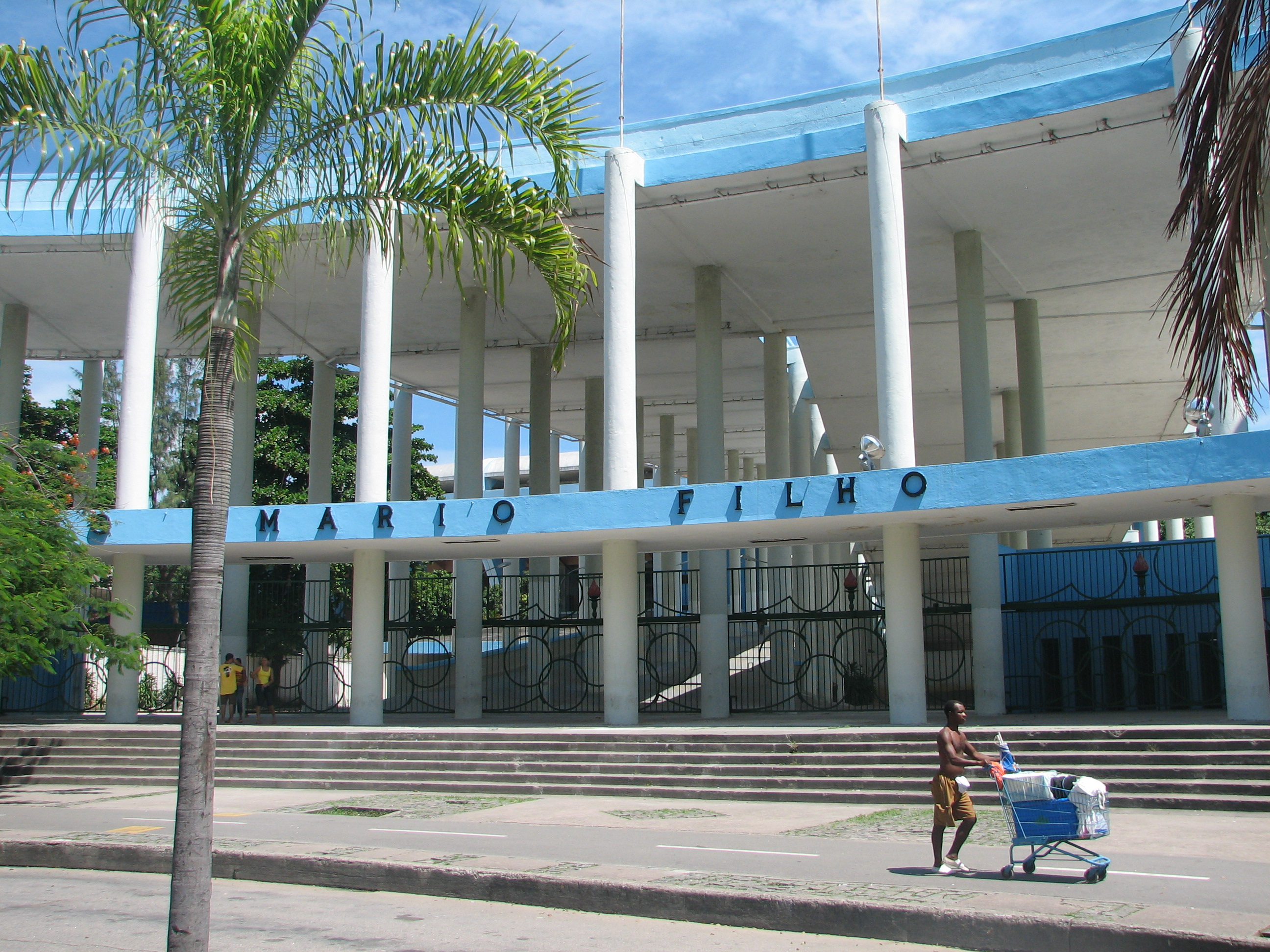 Fachada do Estádio do Maracanã.